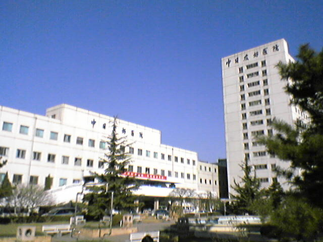 China-Japan Friendship Hospital Zhong-Ri Youhao Yiyuan 中日友好医院